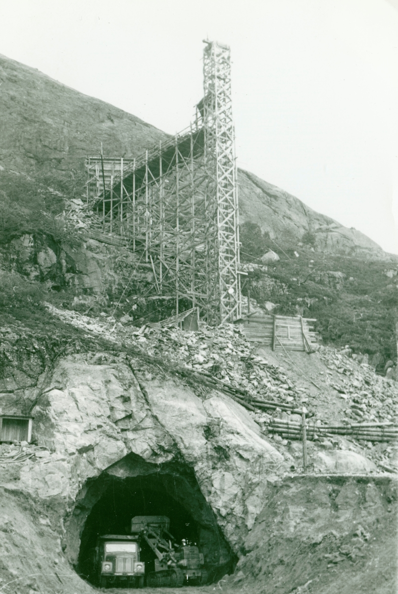 Fra byggingen av Lysebotn kraftverk